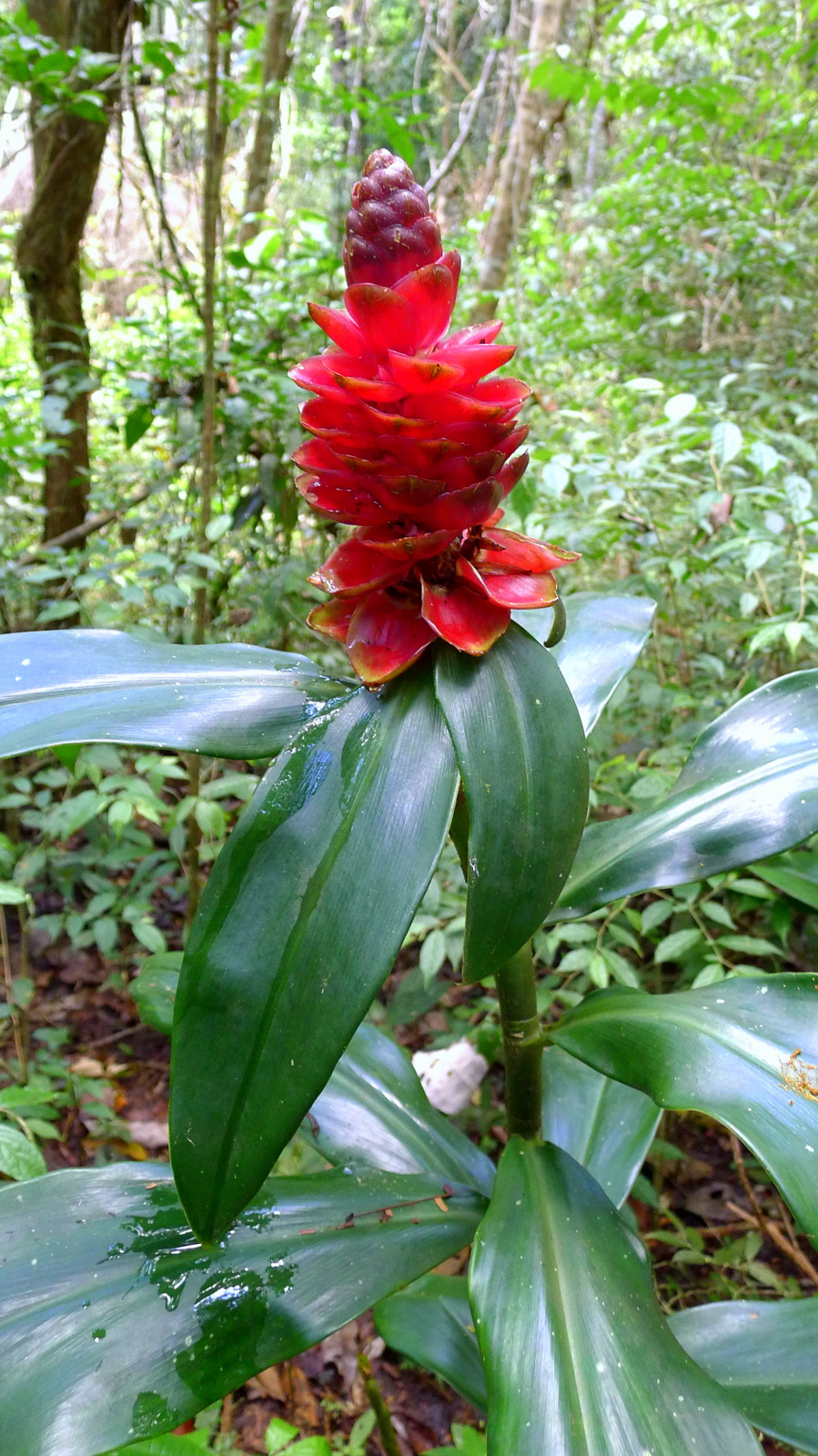 Costus spiralis (Jacq.) Roscoe